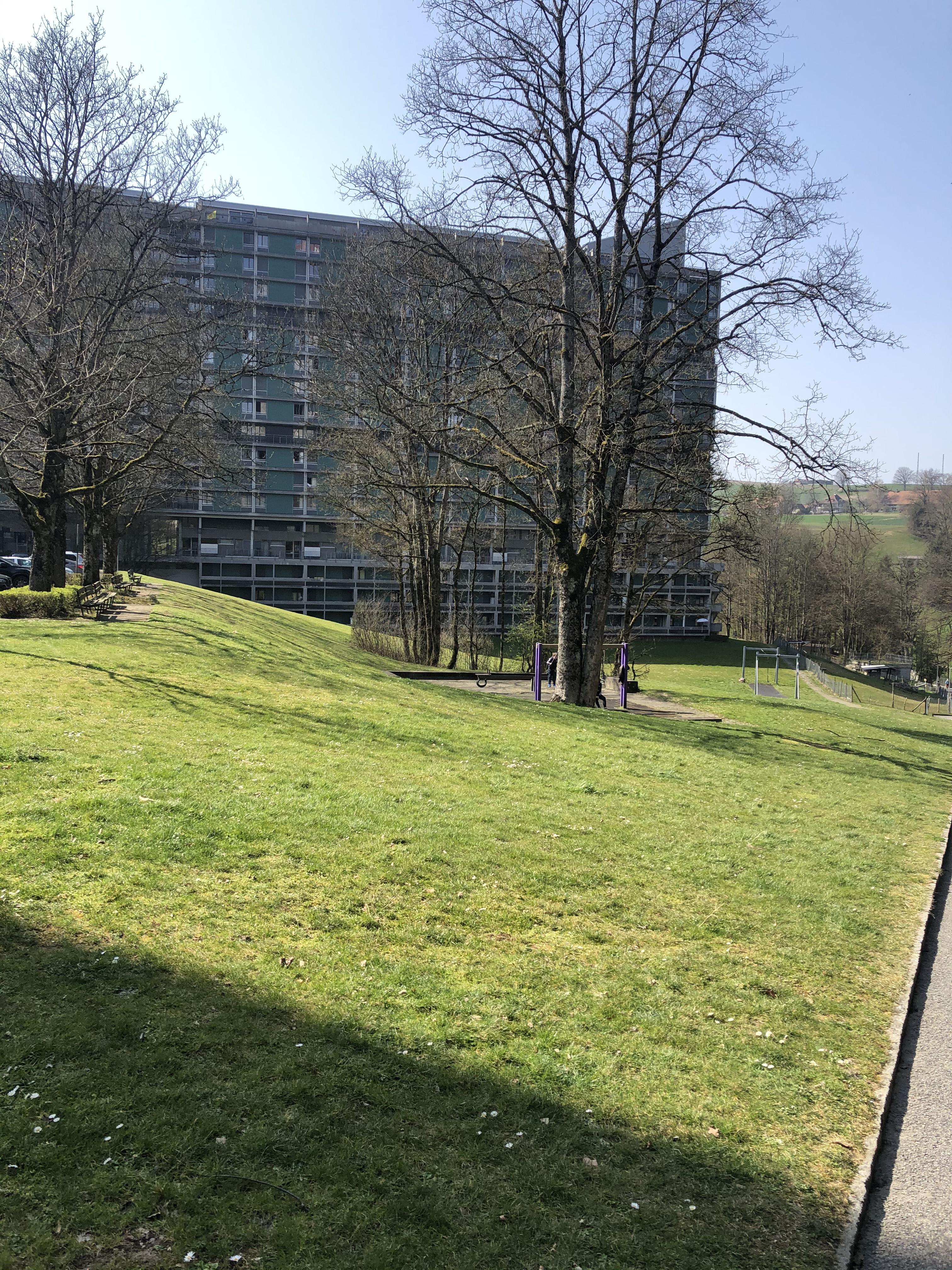 Gäbelbach Hochhausblick vom Tal 2